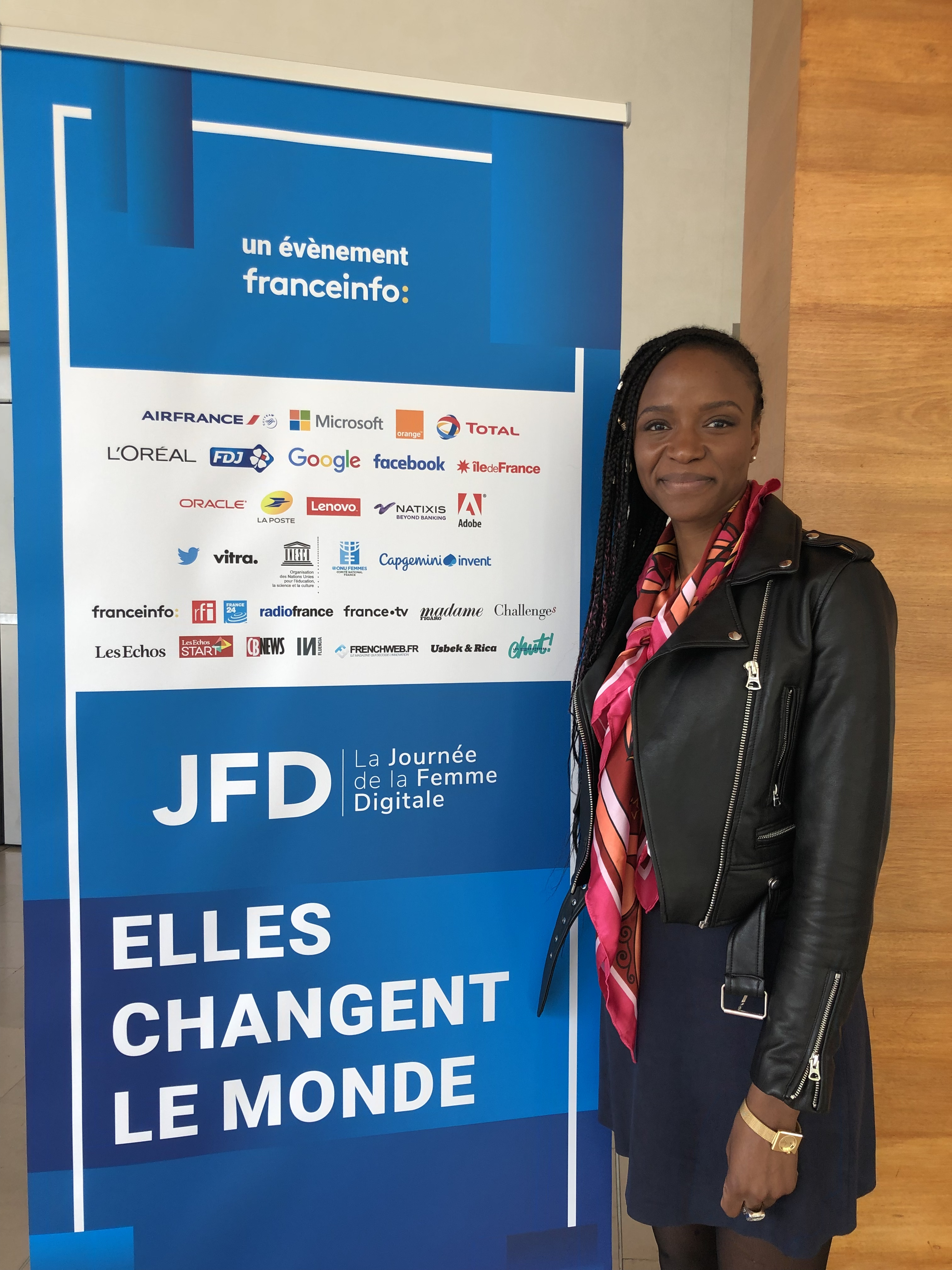 Amanda Ouedraogo à la journée de la femme digitale à la Maison de la radio 2019 à Paris